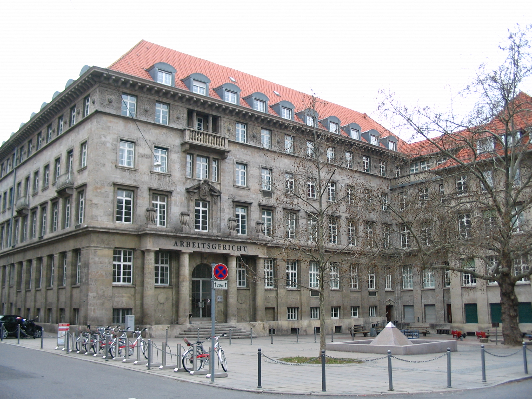 Das Gebäude des Arbeitsgerichts Stuttgart in der Johannesstraße 86.